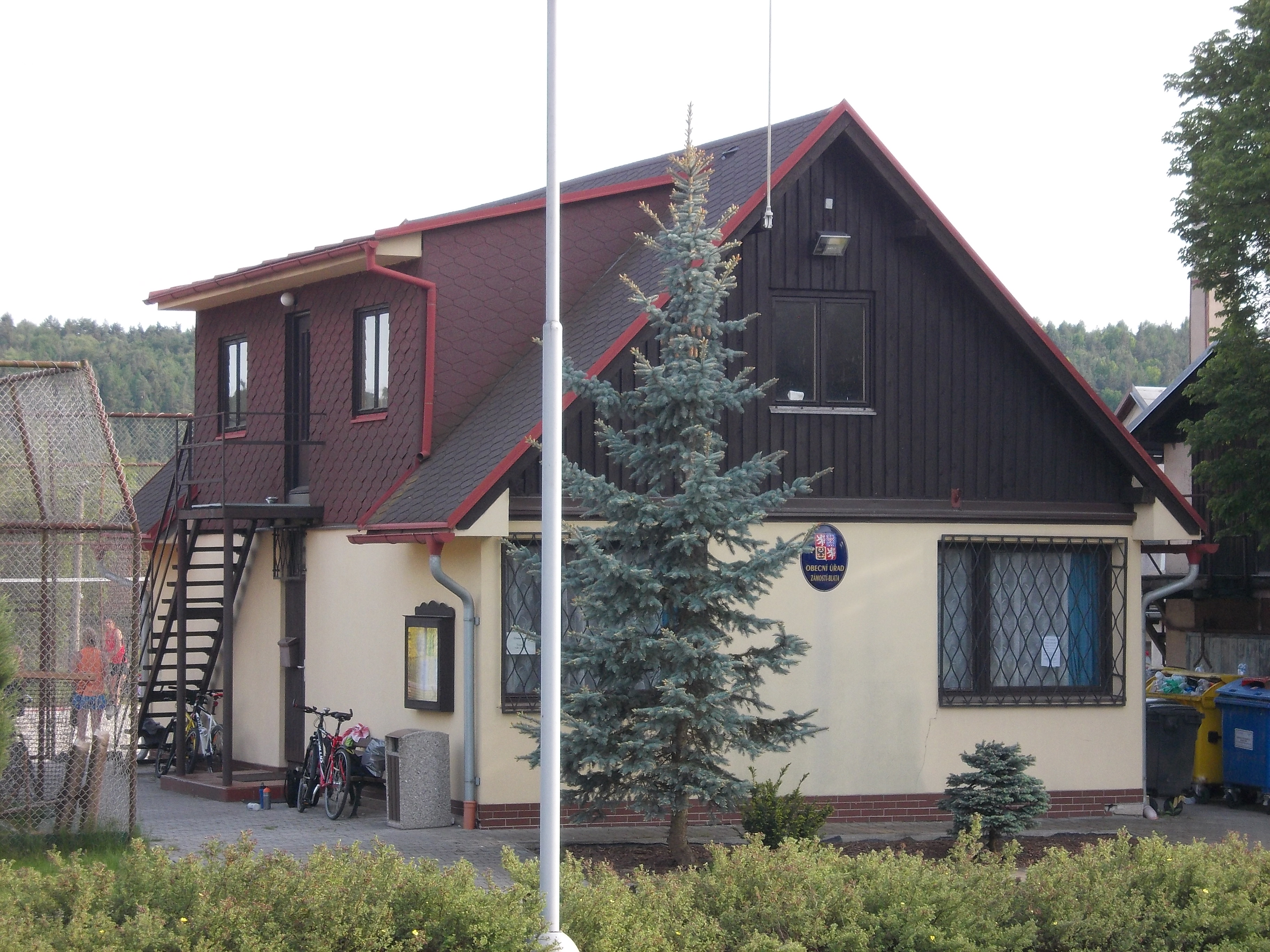 Blata - obecní úřad (č.p. 16)